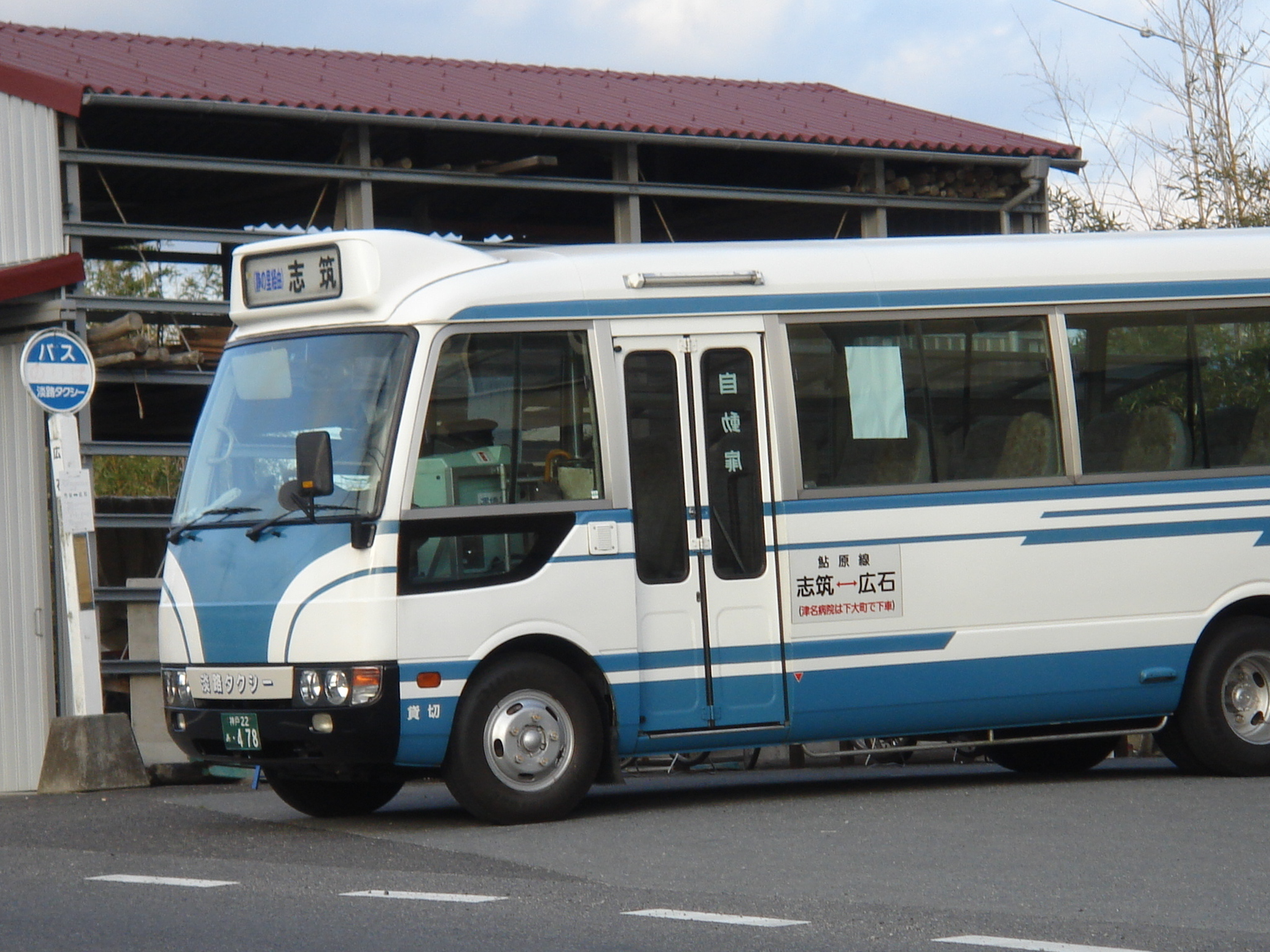 淡路タクシーバス Awaji taxi bus